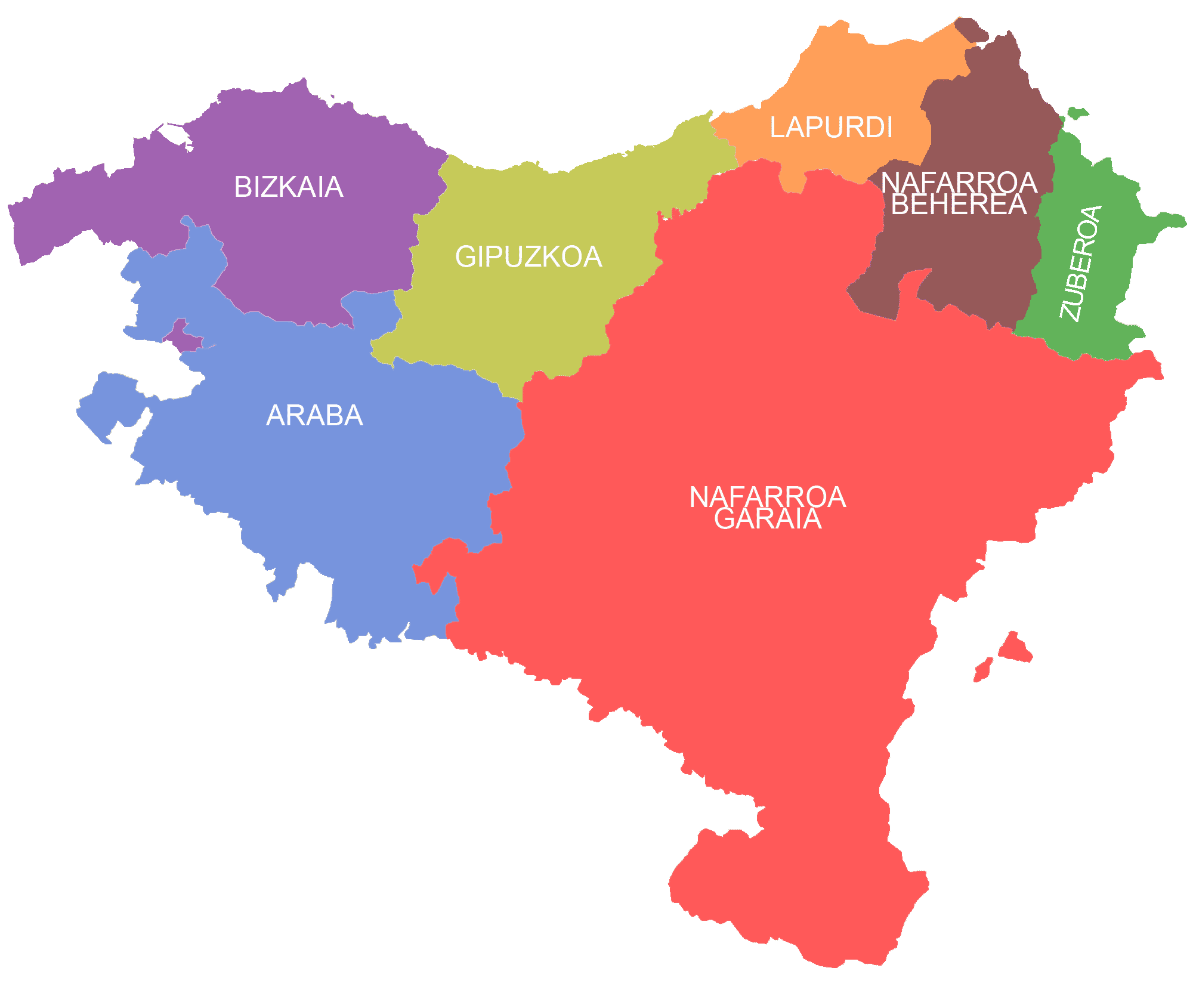 Euskal Herriko mapa-kolorea